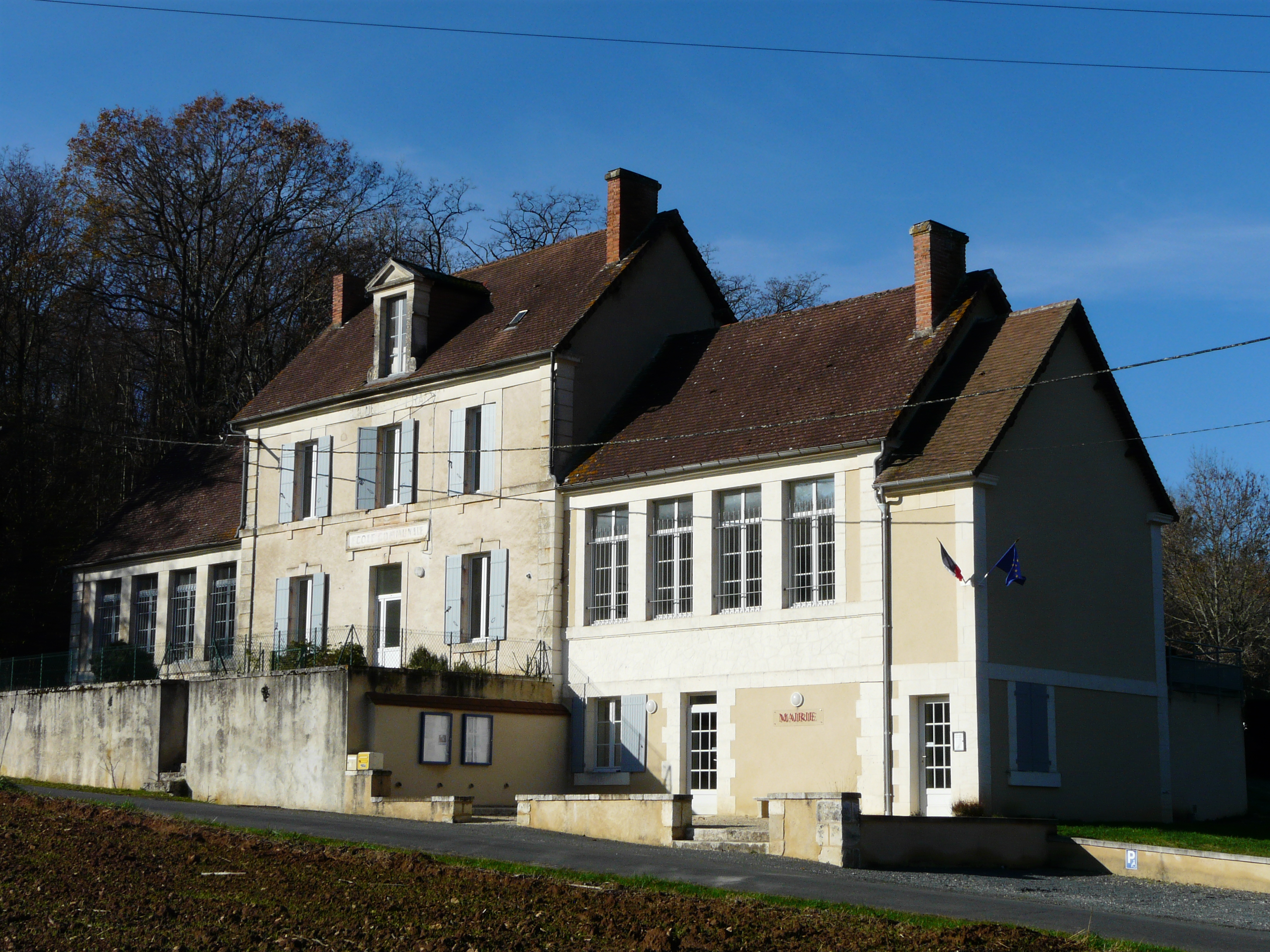 La mairie de Jaure, Dordogne, France.